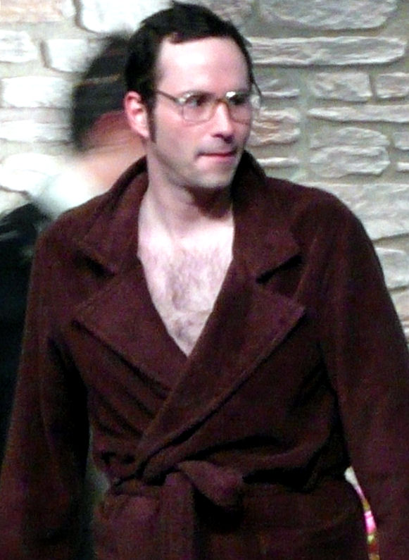 Kurt Krömer in Room Service an der Schaubühne am Lehniner Platz